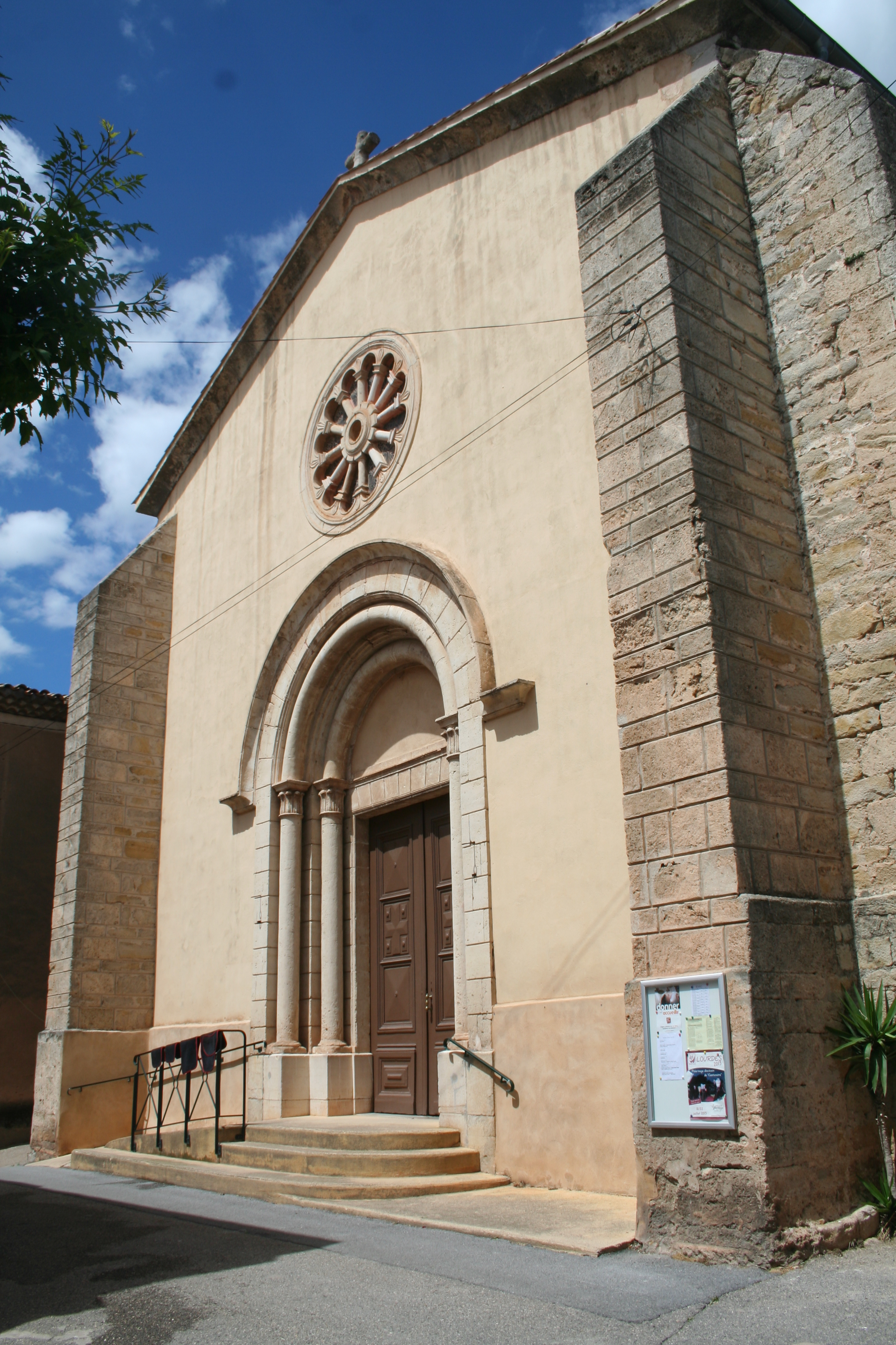 Villeveyrac (Hérault) - portail de l'église Notre-Dame-de-l'Assomption.